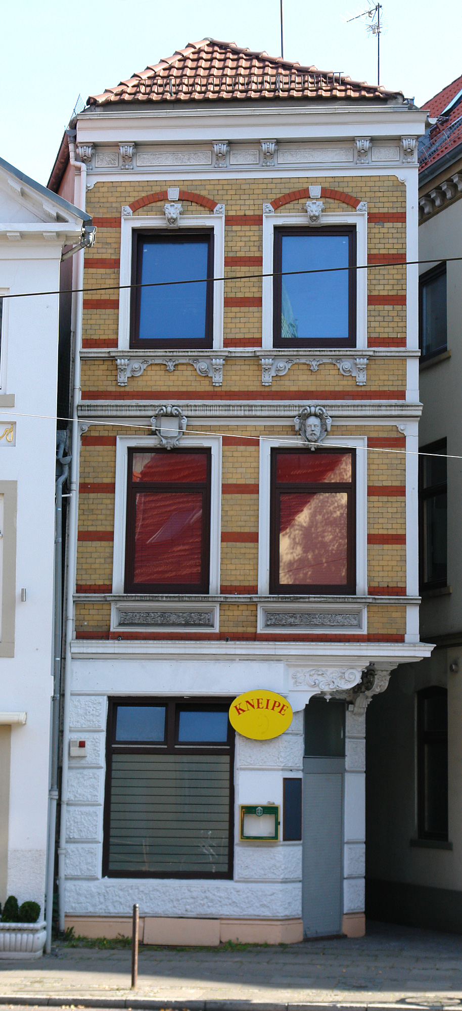 Wohnhaus in Bremen, Violenstraße 9.Das abgebildete Objekt ist ein geschütztes Kulturdenkmal in der Freien Hansestadt Bremen, mit der Nr. 1187 beim Landesamt für Denkmalpflege registriert.